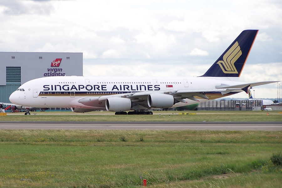 9V-SKG A380 Singapore